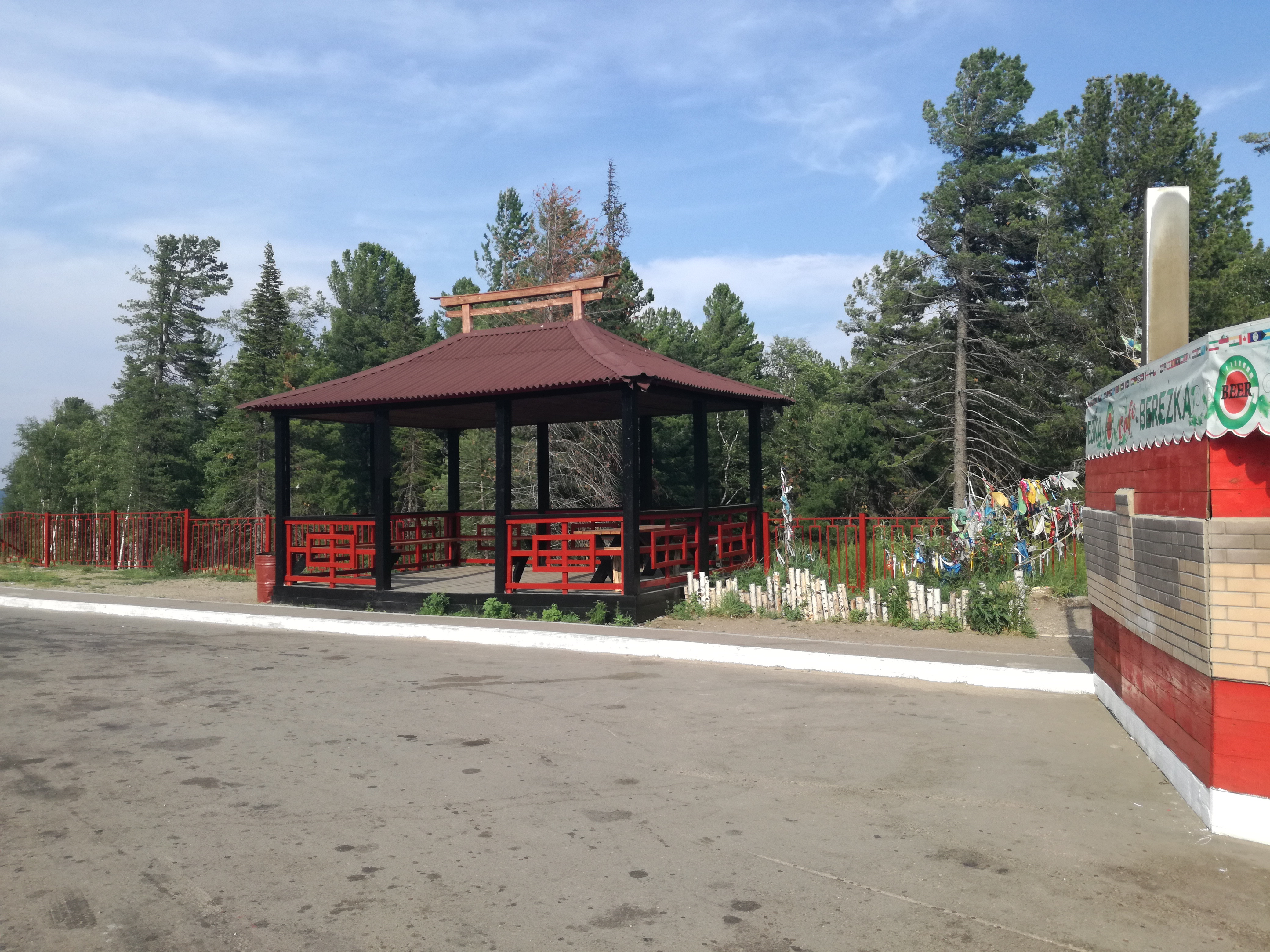 Перевал Пыхта